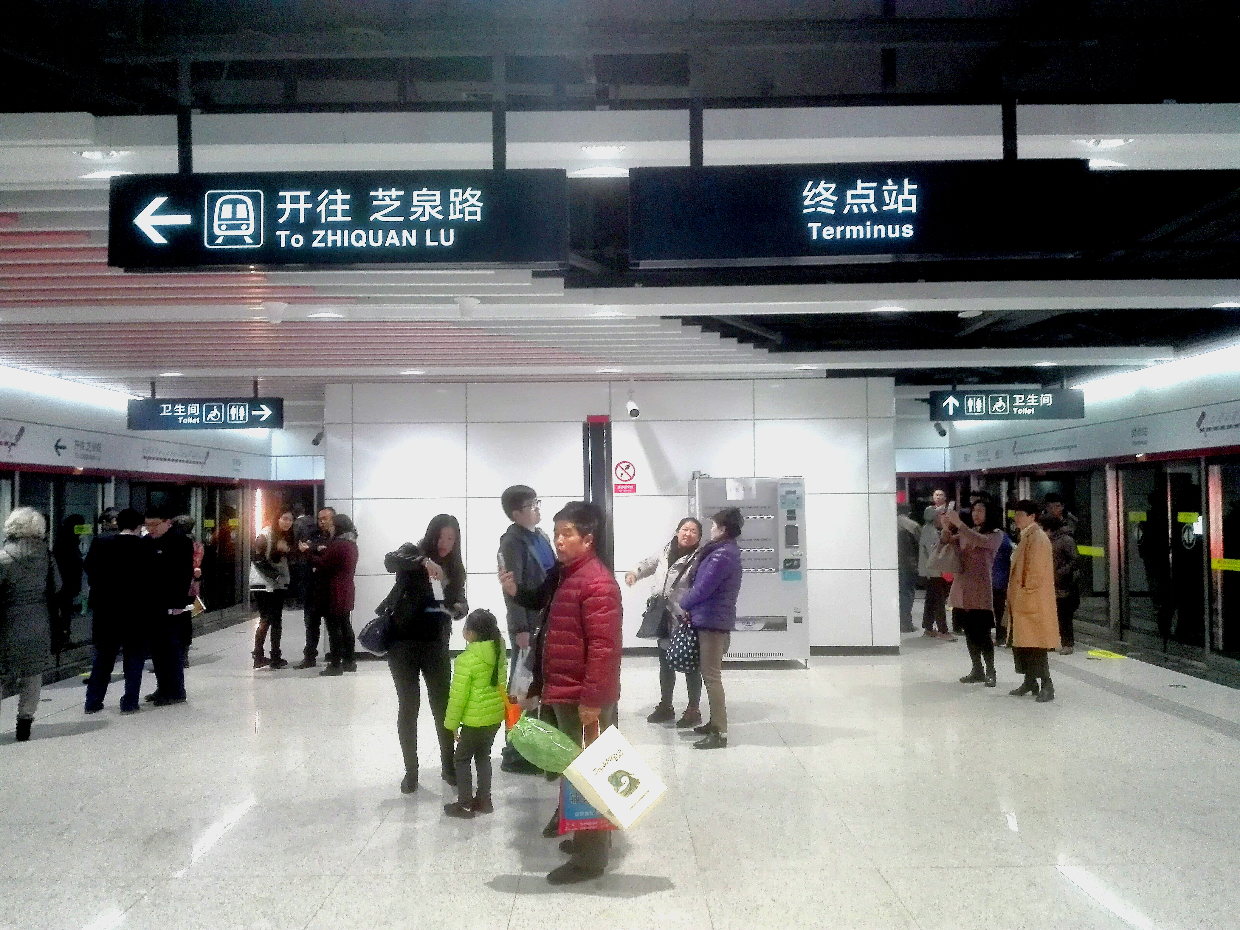 青岛地铁2号线李村公园站站台